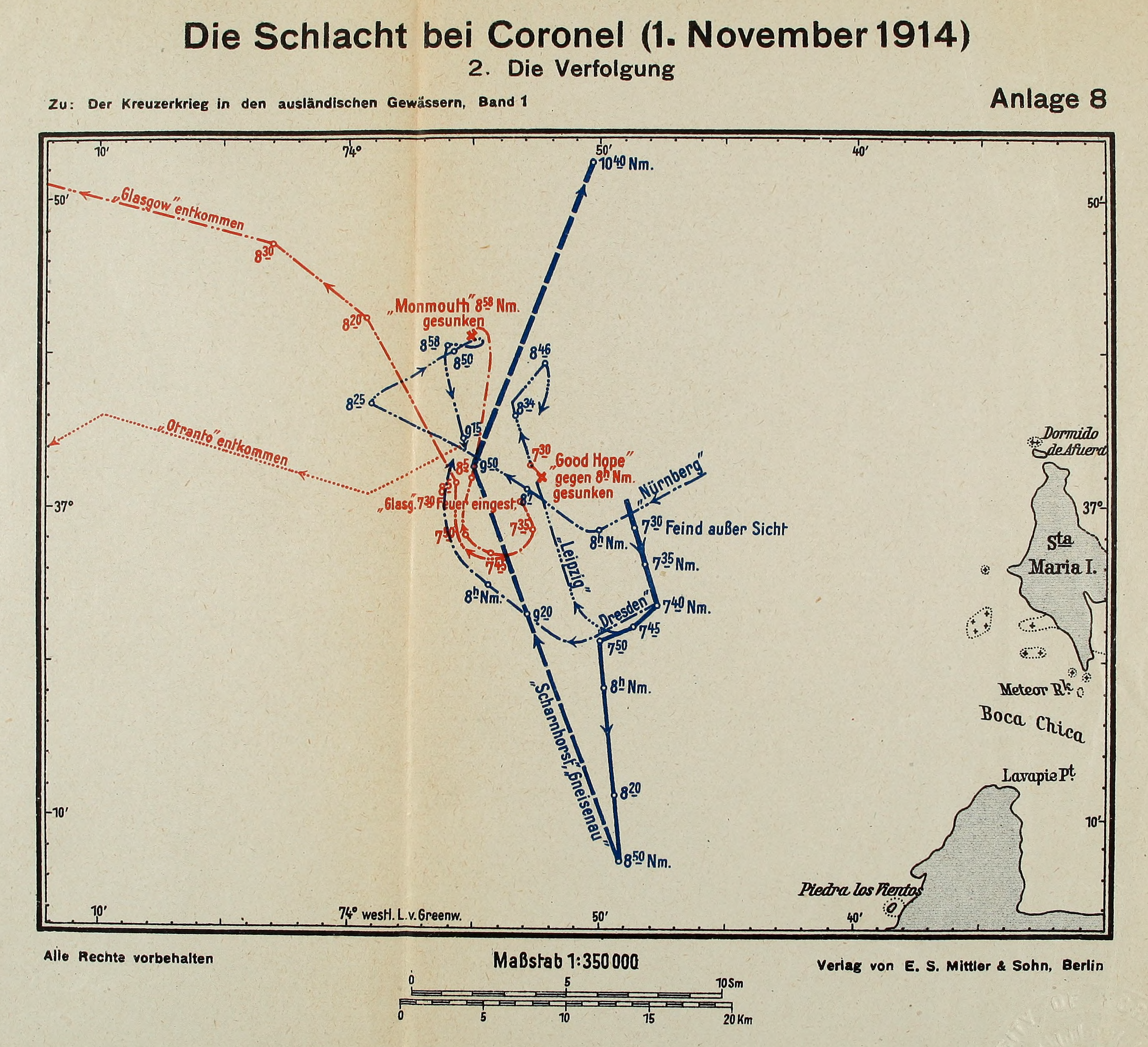 Schlacht bei Coronel (1. November 1914), 2. Die Verfolgung